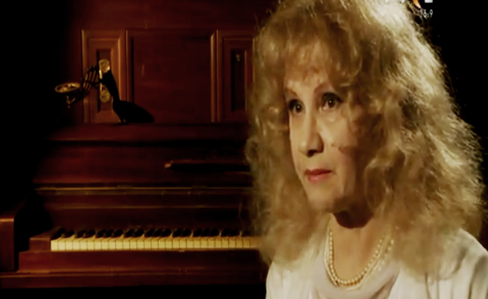 Ioana Diaconescu, interviu "Rezistenta prin cultura"